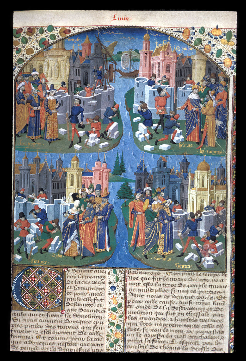 Bouquechardière BL - Harley 4376 F. 150 Construction de Venise, Sicambrie, Carthage et Rome